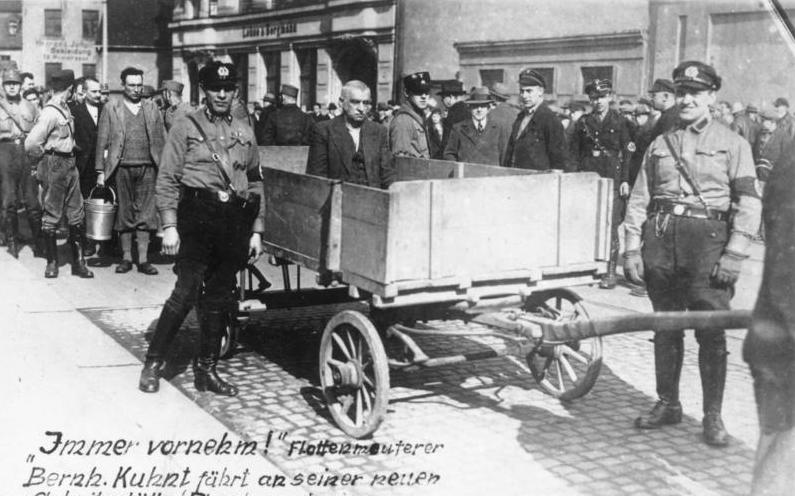 Zentralbild Aus der deutschen Arbeiterbewegung, Naziterror gegen die deutsche Arbeiterklasse UBz.: Der ehemalige Ministerpräsident von Oldenburg [Bernhard] Kuhnt wurde am 9.3.1933 durch den SA-Marinesturm Chemnitz verhaftet und mußte mit anderen politischen Häftlingen unter den Knüppeln der SA-Henker Wände abwaschen. (Die Texte auf dem Foto stammen von den Nazis.): "Immer vornehm! Flottenmeuterer Bernh. Kuhnt fährt an seiner neuen Arbeitsstätte (Dreckwaschen) vor."